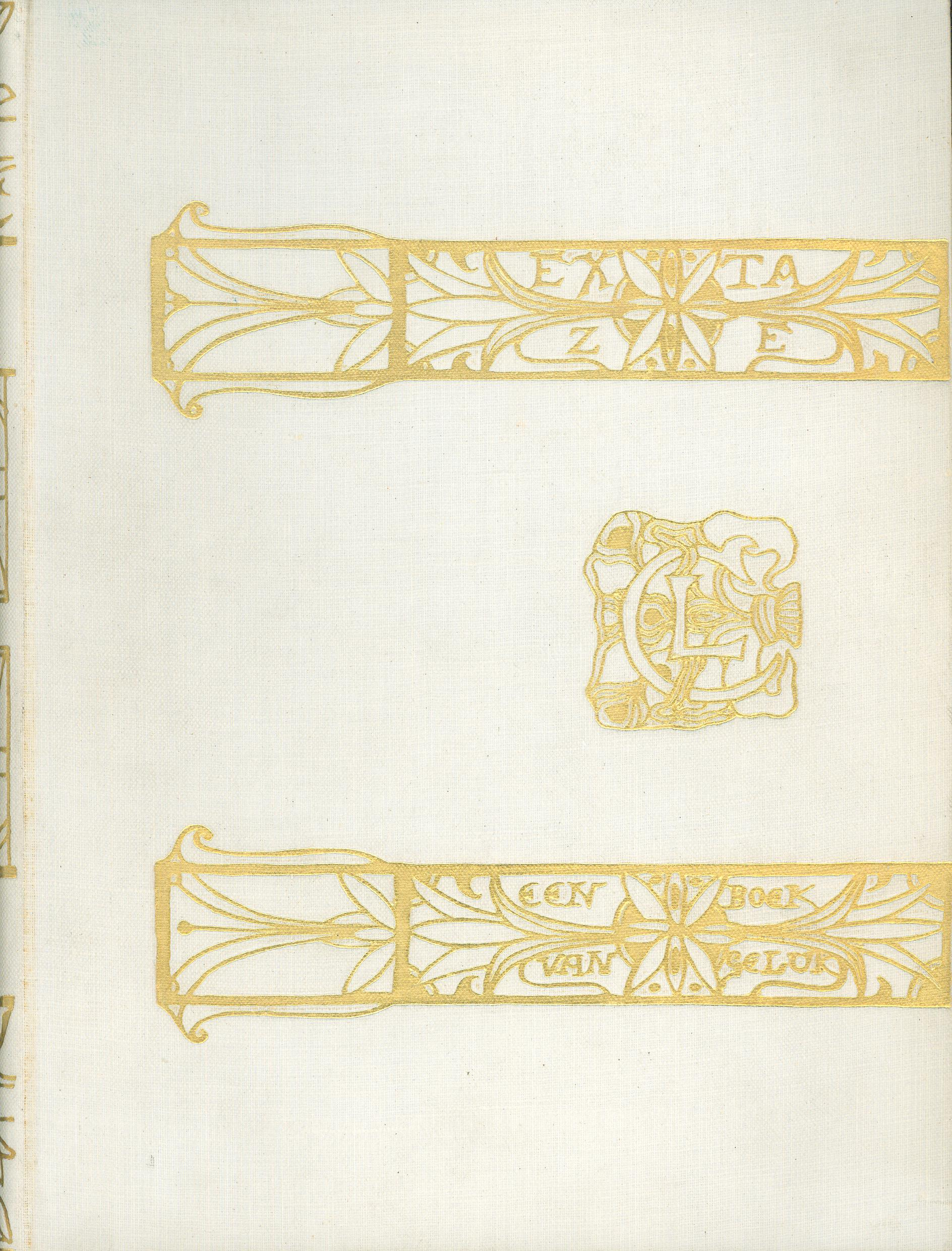 Boekband Extaze Louis Couperus, ontwerp R.N. Roland Holst